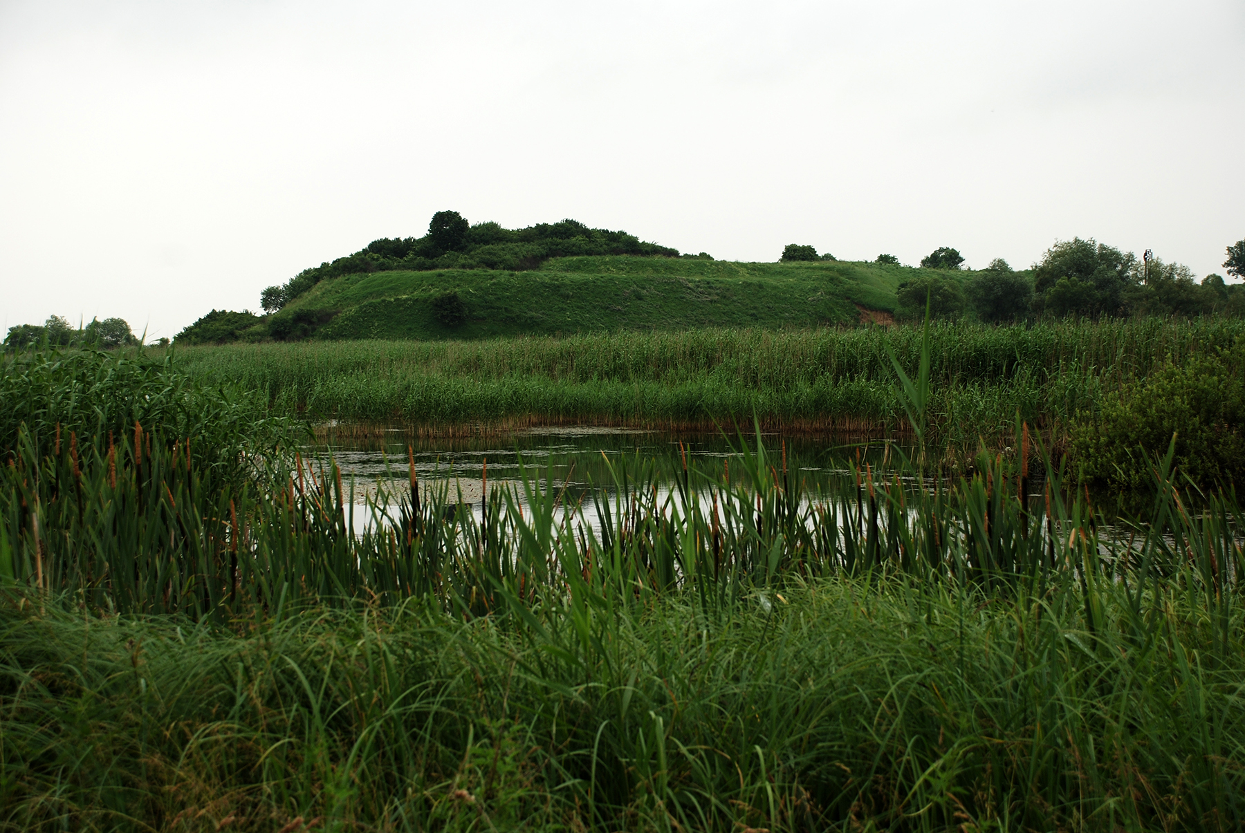 Городище давньоруське літописного міста Зудичева, Жидачів, ур.Замок, на східній околиці міста